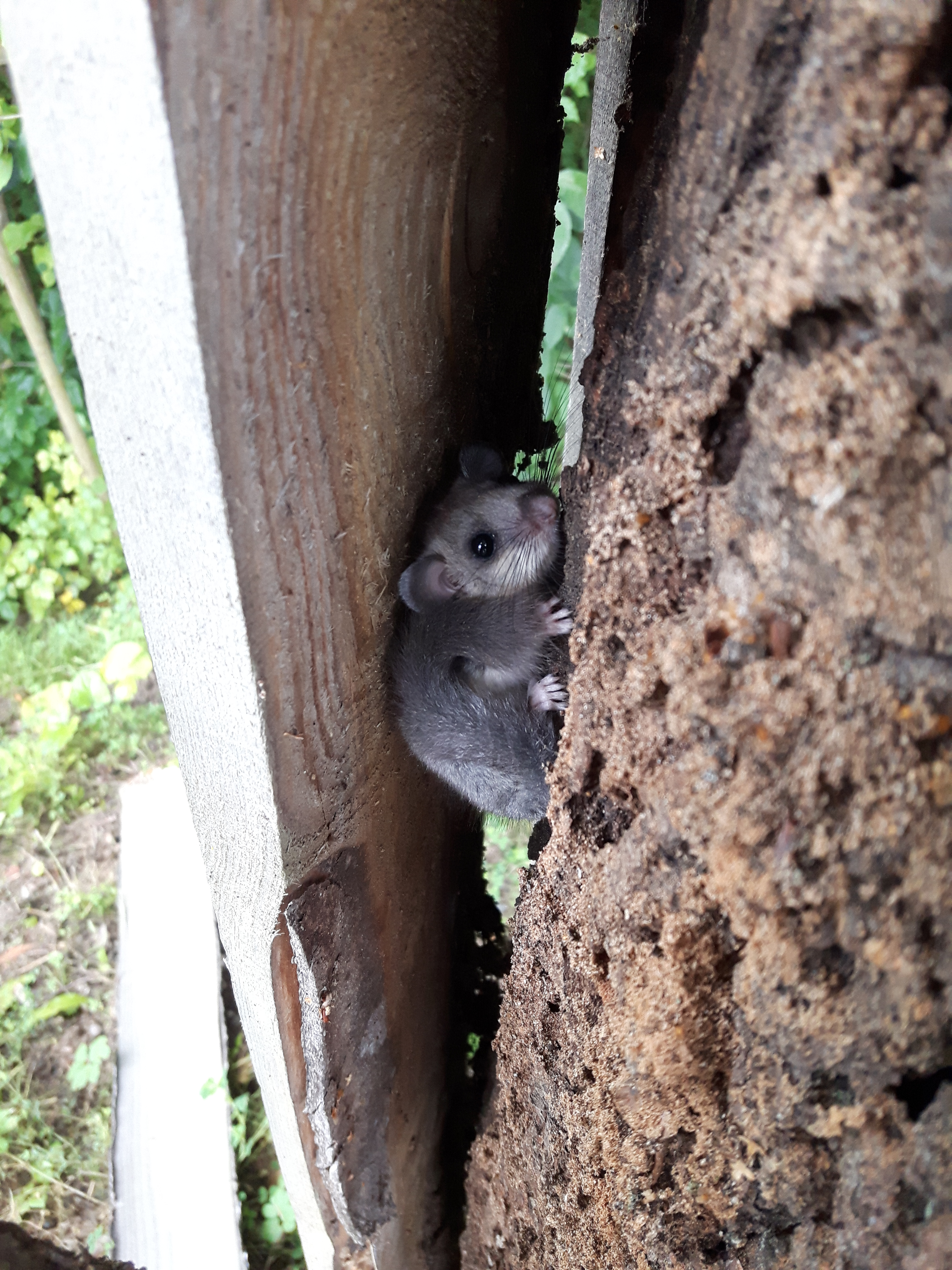 Popielica w schronieniu na pniu drzewa, Wysoczyzna Elbląska (Polska)